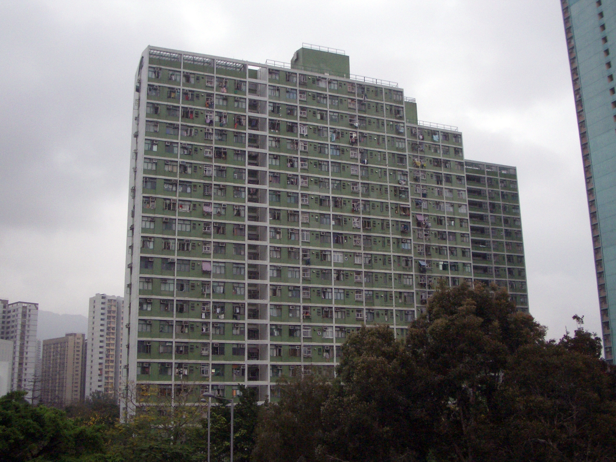 Lok Tung Hse, Lok Fu Est, Kowloon, Hong Kong